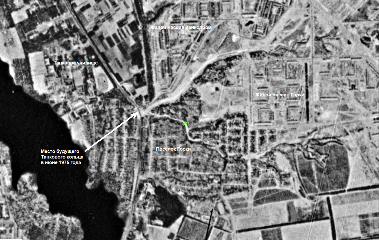 Казань. Место будущего Танкового кольца на Оренбургском тракте, в районе посёлка Горки